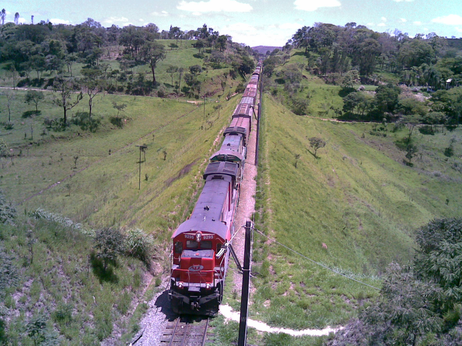 Comboio que passava sentido Boa Vista na Variante Boa Vista-Guaianã km 169 em Mairinque